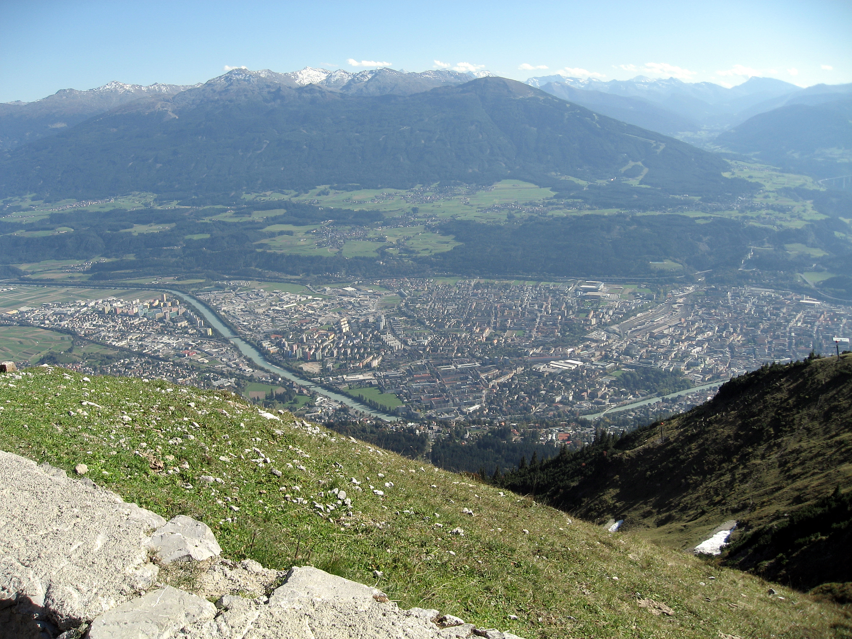 Österreich, Innsbruck, Hafelekar, Blick von der Mittelstation "Seegrube" (1.905 Meter) auf Innsbruck